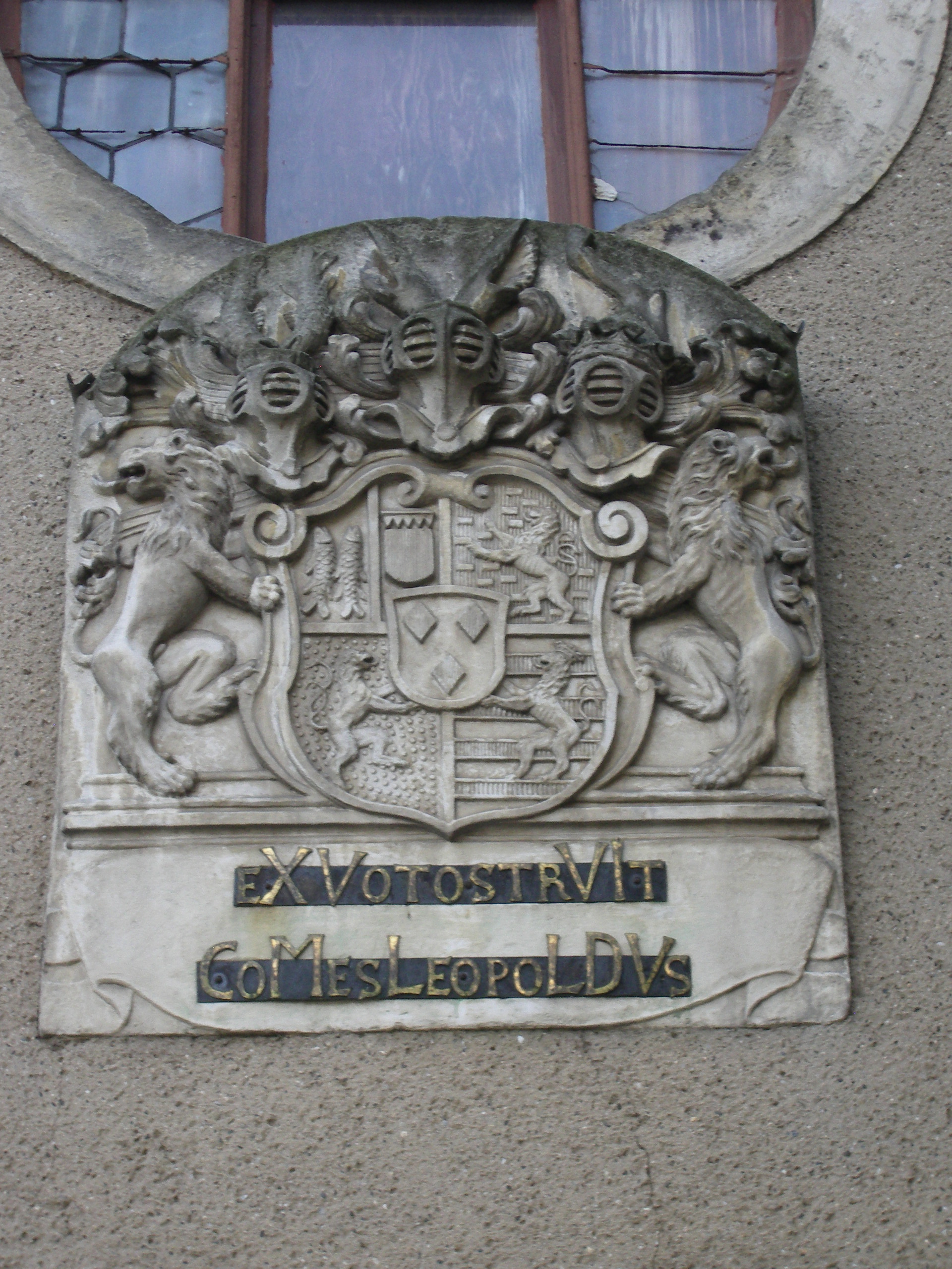 Wappen des Erbauers der Wallfahrtskirche Graf Leopold zu Salm-Reifferscheidt-Hainspach. Es befindet sich oberhalb des Kirchenportals.